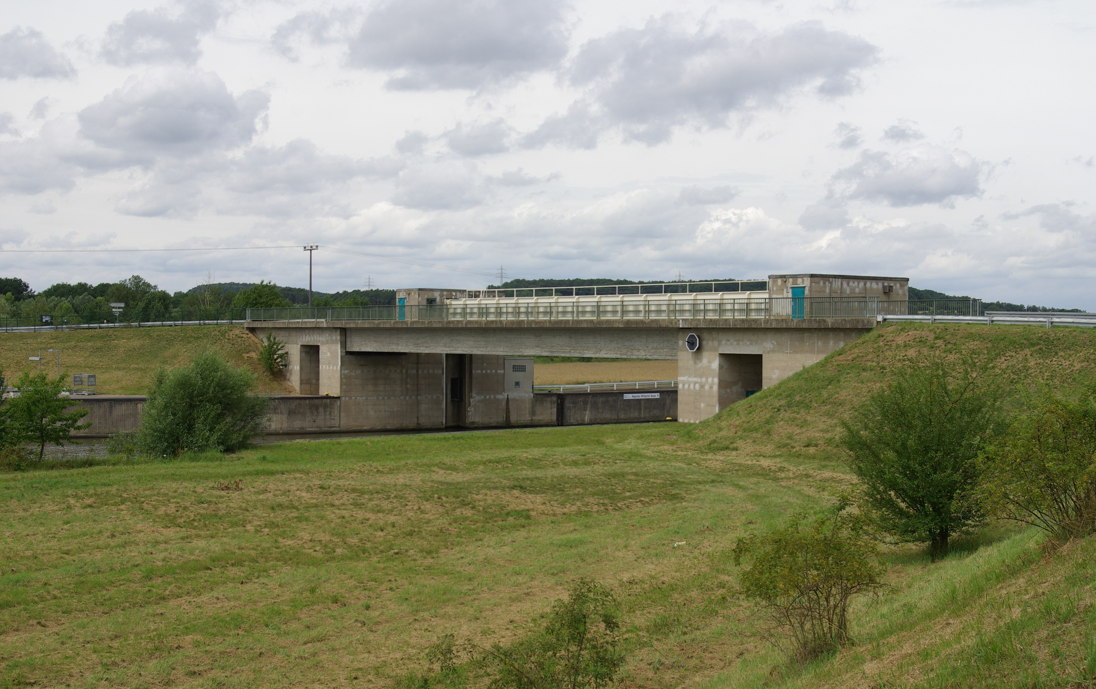 Hochwassersperrtor in Neuses an Regnitz (Eggolsheim) am Main-Donau-Kanal